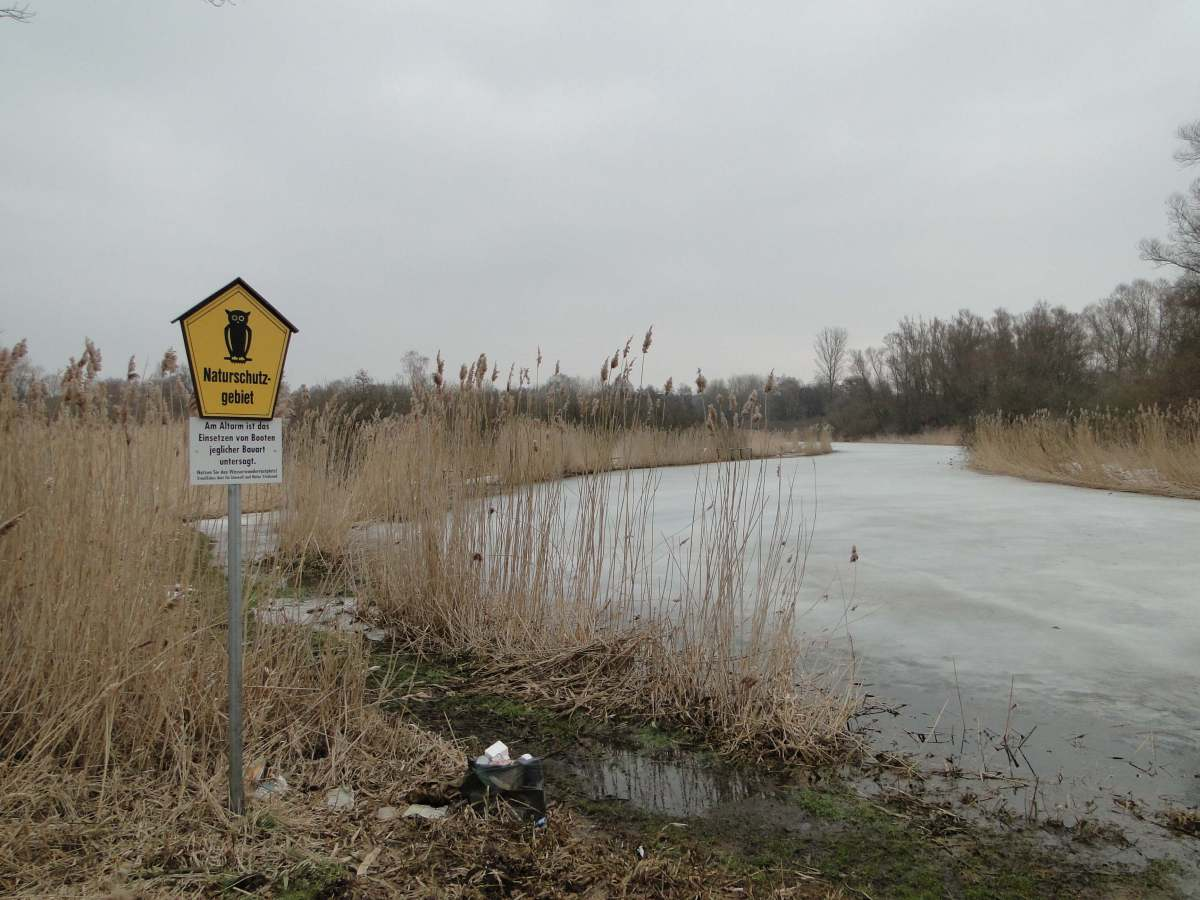 Blick in das Naturschutzgebiet „Unteres Recknitztal“, Altarm der Recknitz, Nähe Marlow, Mecklenburg-Vorpommern.